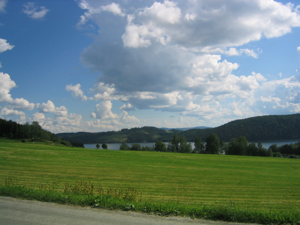 View towards Reinsvatnet from Reinsvegen, in Nord-Trøndelag, Norway.